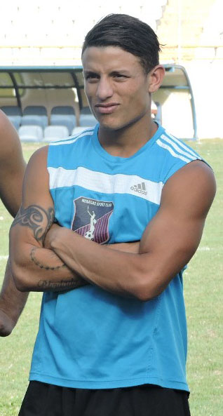 Entrenando